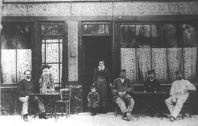 L'auberge où mourut van Gogh